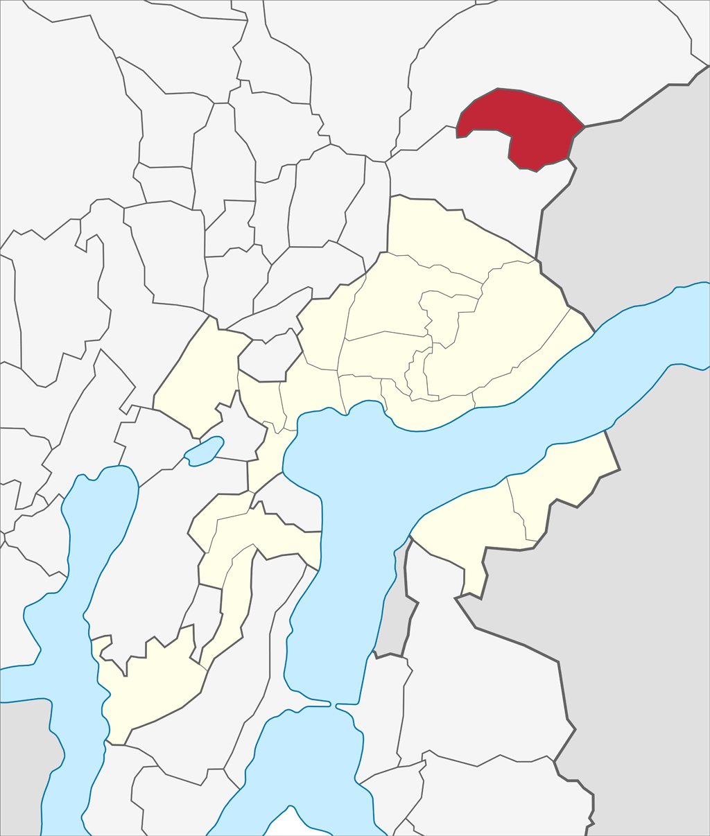 Localizzazione del quartiere di Villa Luganese nel territorio comunale di Lugano